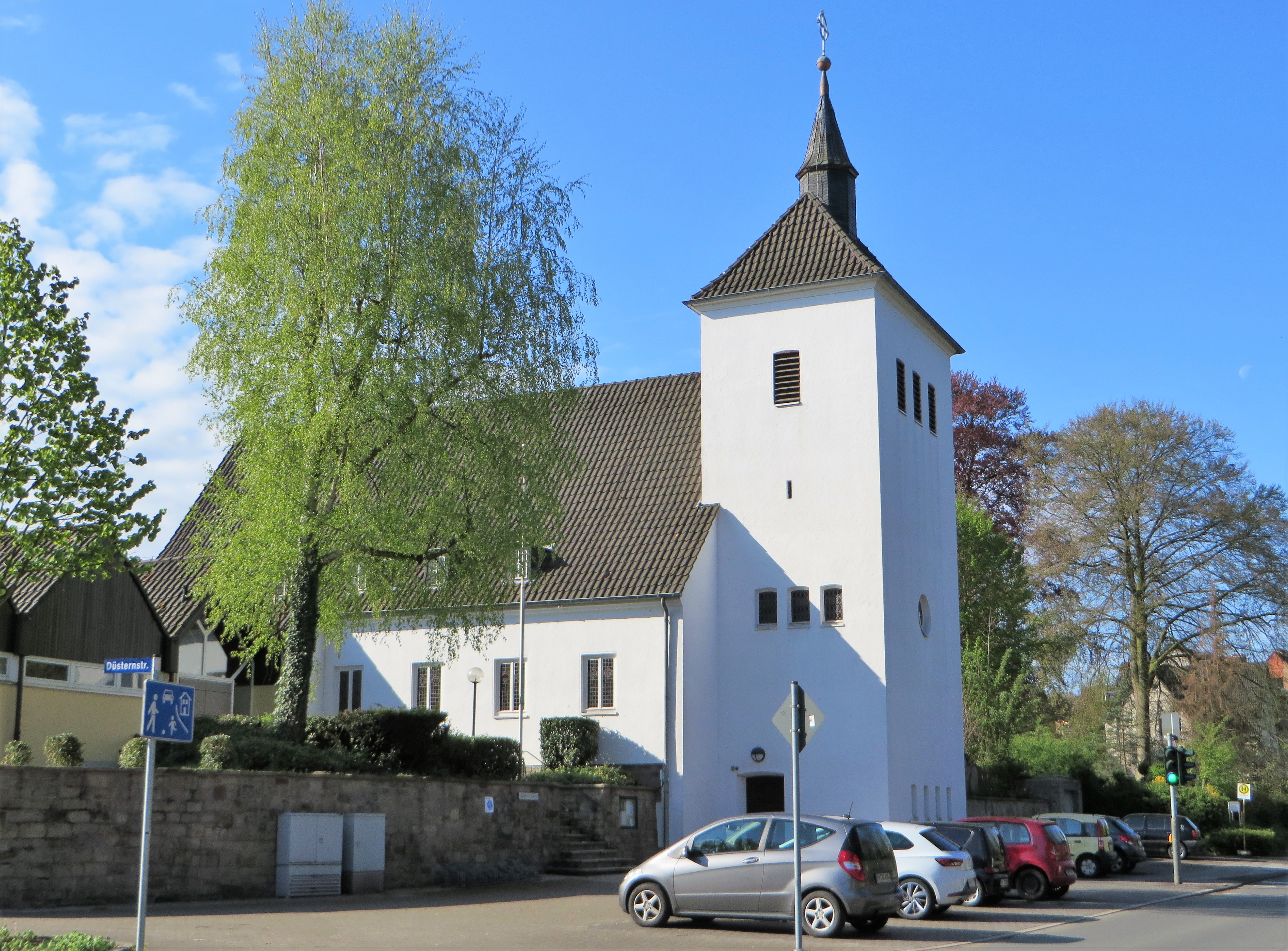 Evangelisch-lutherische Friedenskirche in Hagen-Halden, Berchumer Straße / Ecke Düsternstraße. Die Kirche wurde am 14. April 1952 eingeweiht und gehört heute zur ev.-luth. Kirchengemeinde Halden-Herbeck-Fley.